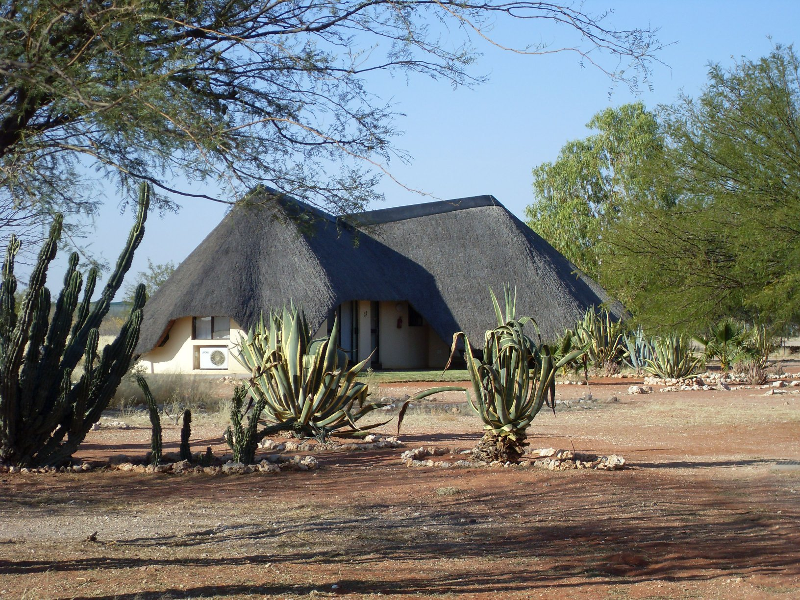 Bitterwasser Lodge, Namibia.